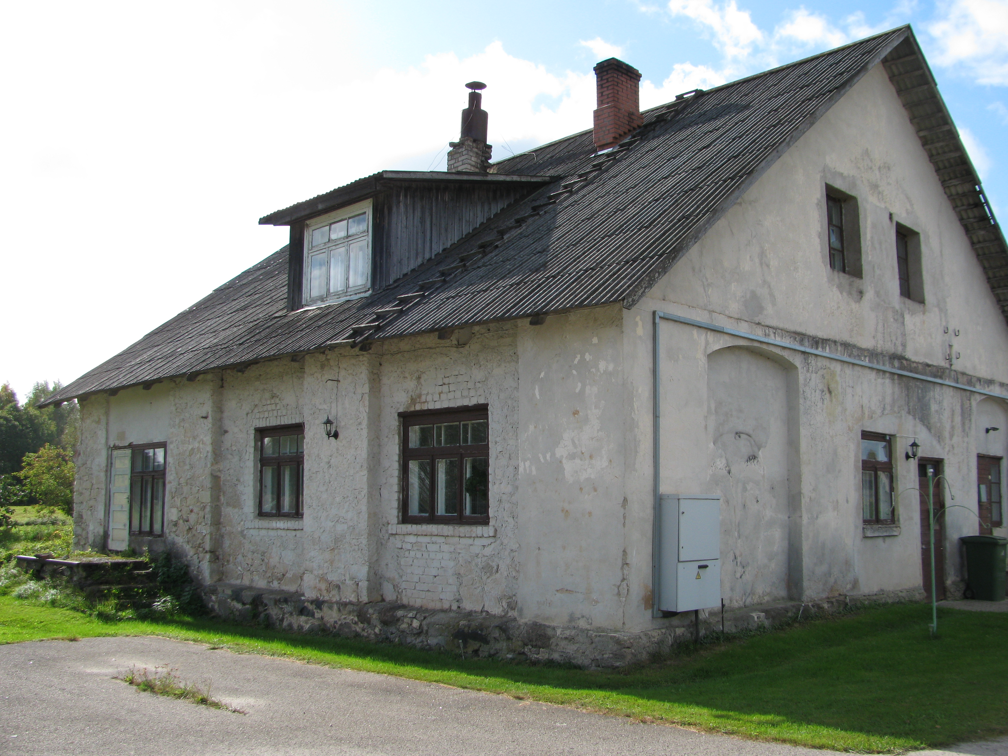 Līzespasta krogs, Līzespasts